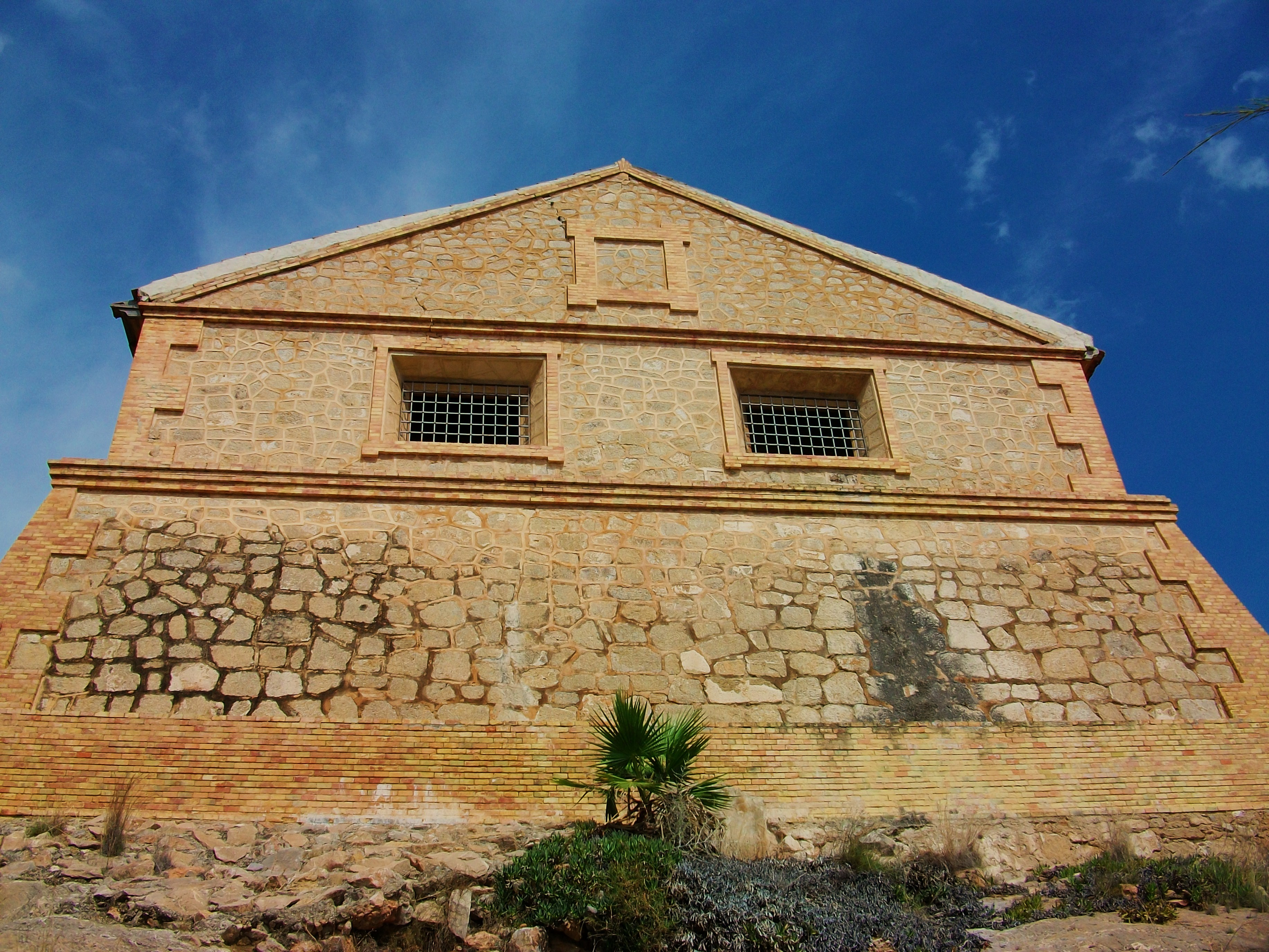 Pous del Cremós d'Oriola.